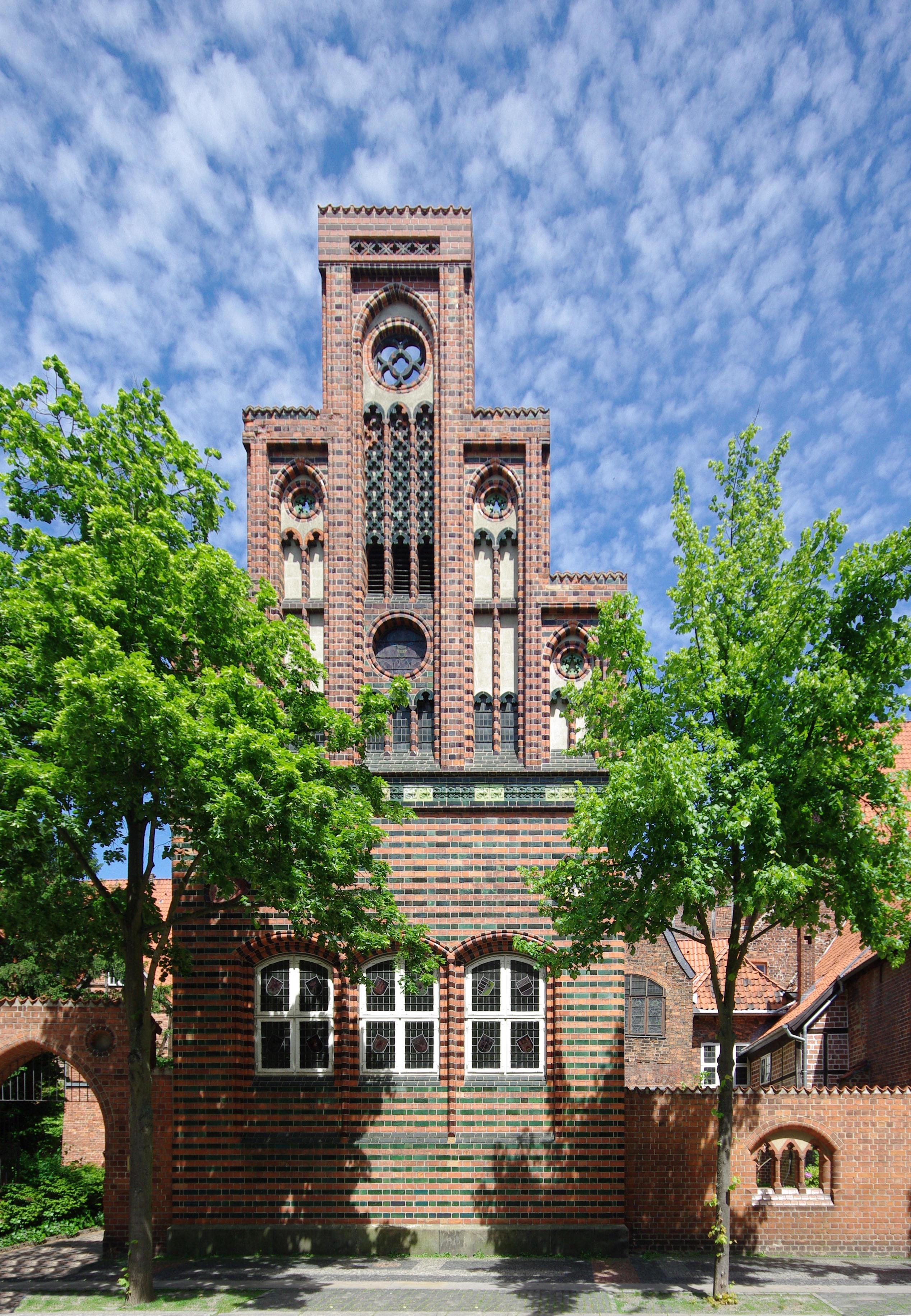 Rathaus in Lüneburg, Südansicht, Archivmagazin von 1899